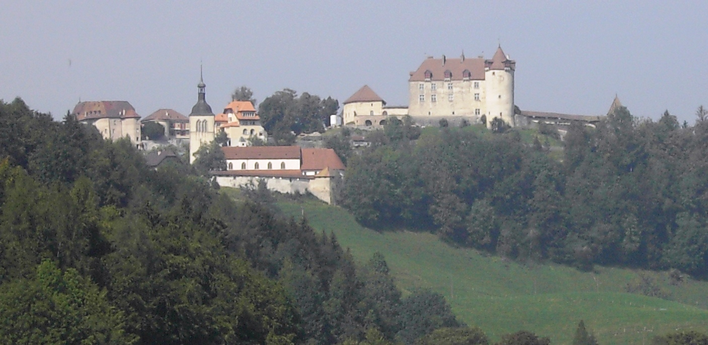 Greyerz im Greyerzerland, Kanton Freiburg, Schweiz